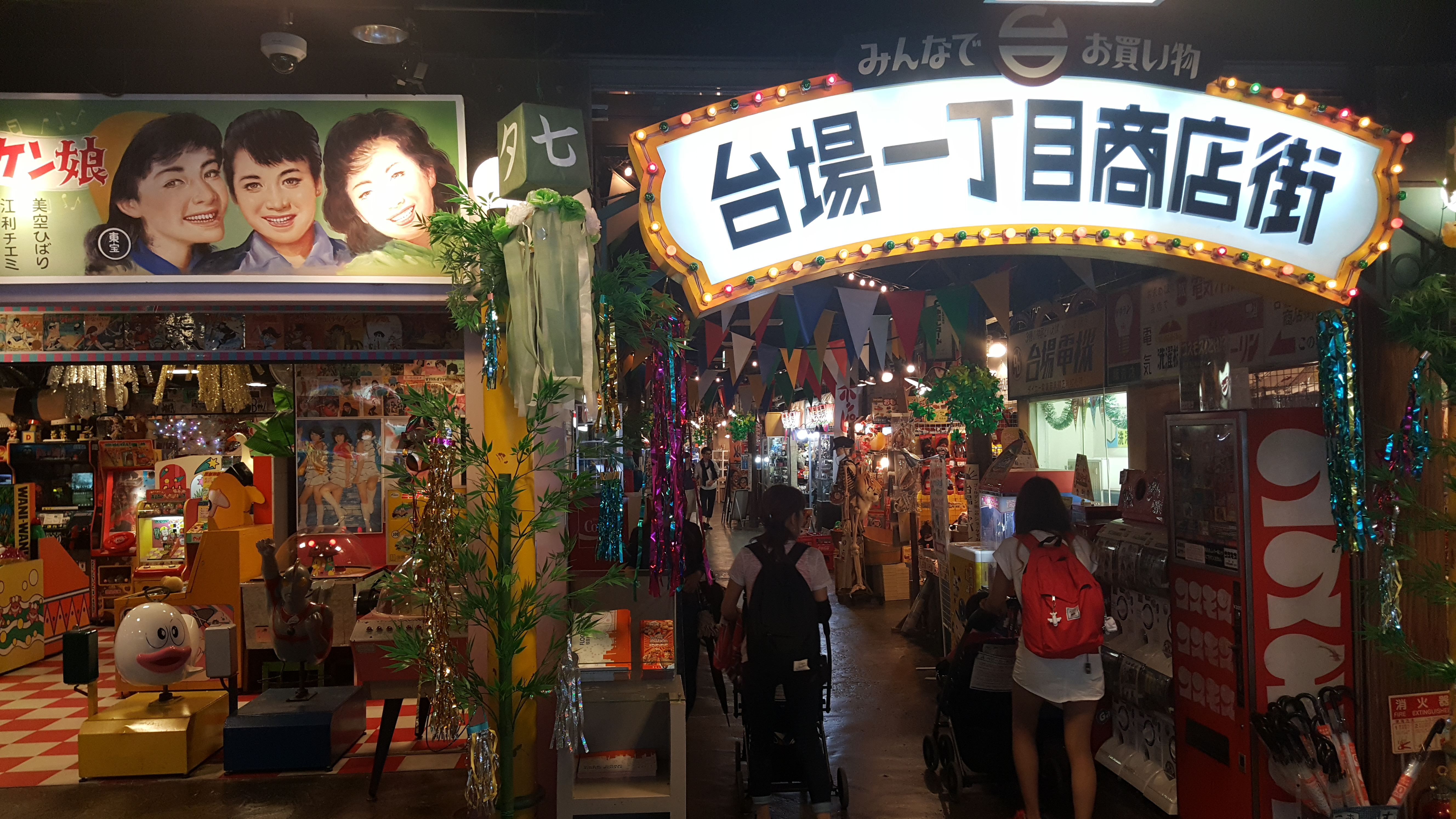 2016년 6월 덱스 도쿄 비치 4층 다이바잇쵸메의 입구